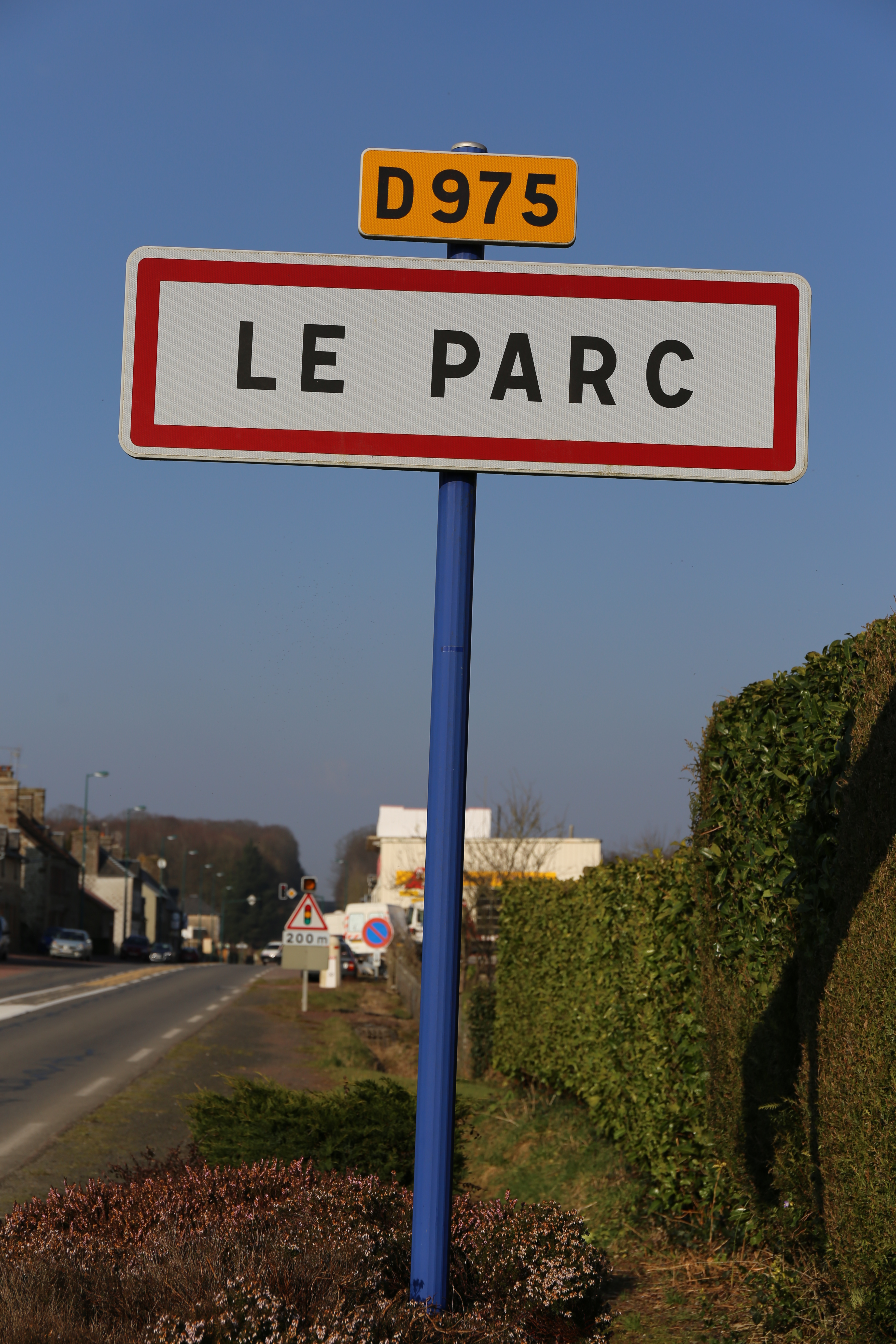 Panneau d'entrée sud du Le Parc sur la RD 975.